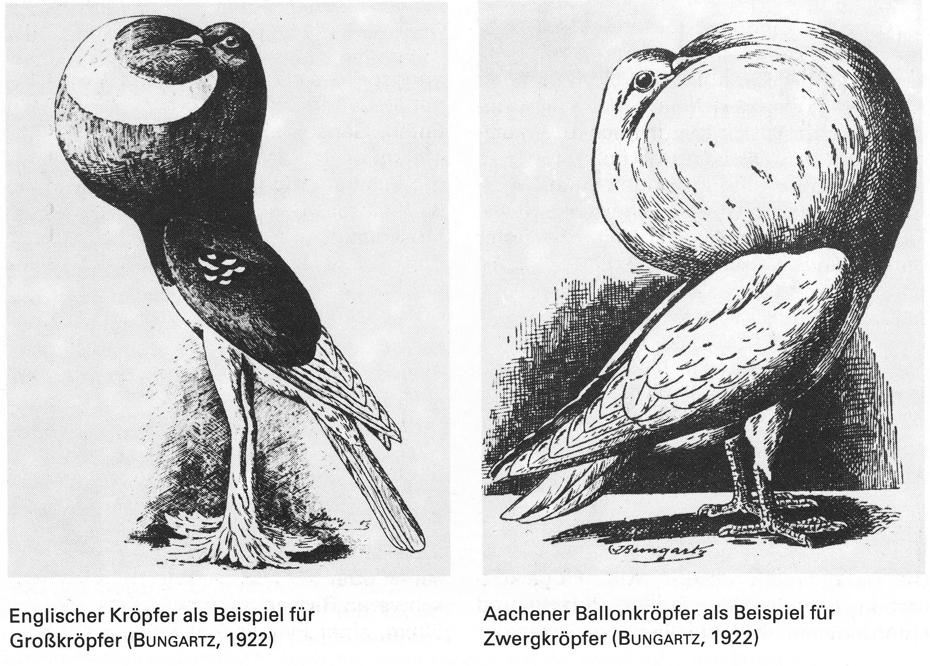 see derivative works